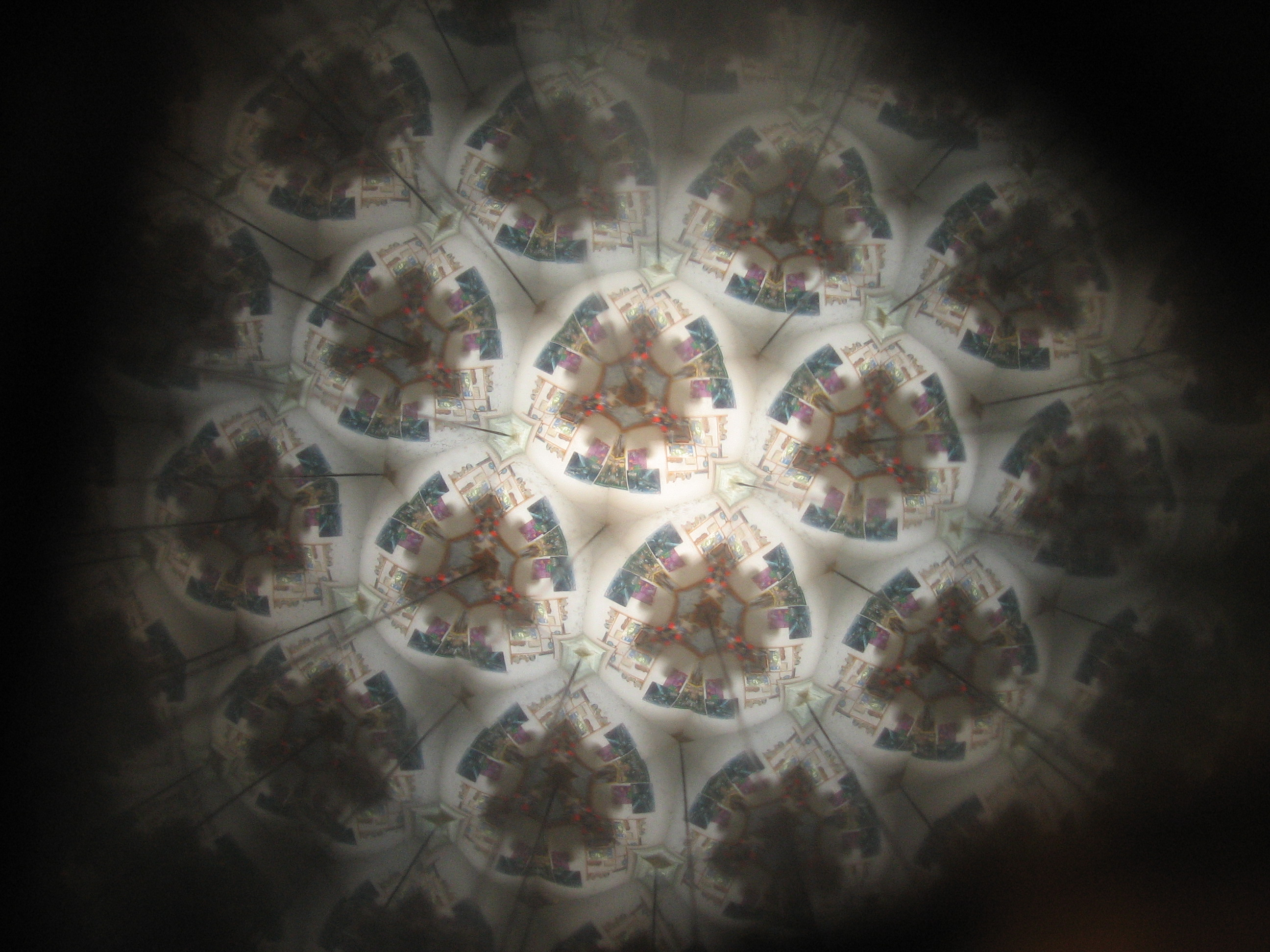 Kalidoskop iznutra